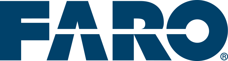 Logo FARO